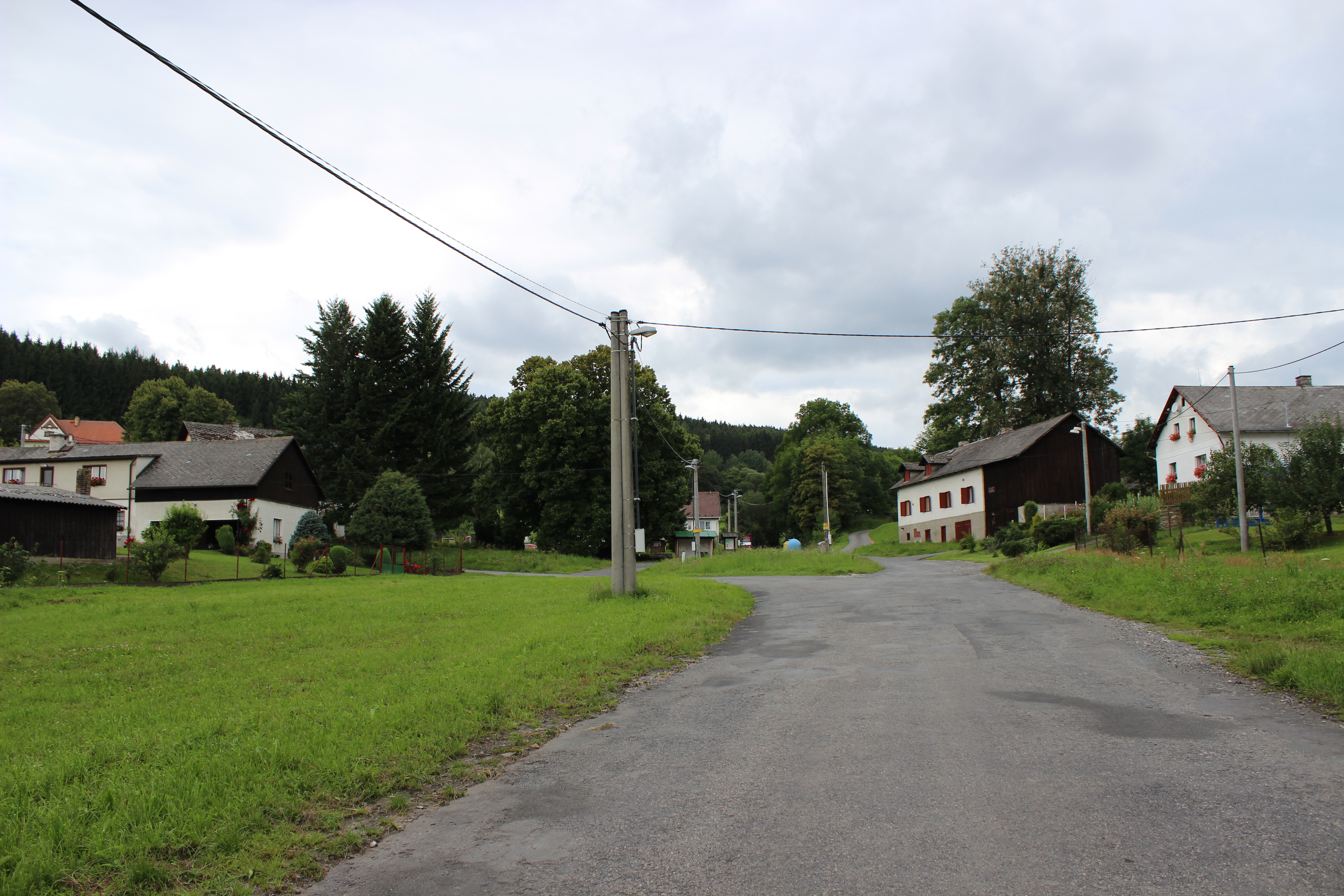 Náves v Dolejším Těšově (pohled od východu).